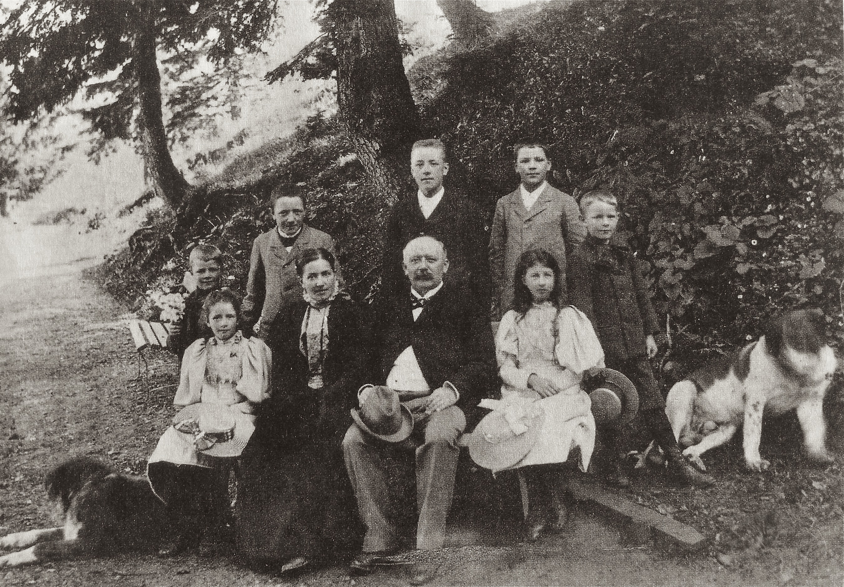 Anton Bon um 1914 mit Frau Maria, Söhnen und Familienangehörigen